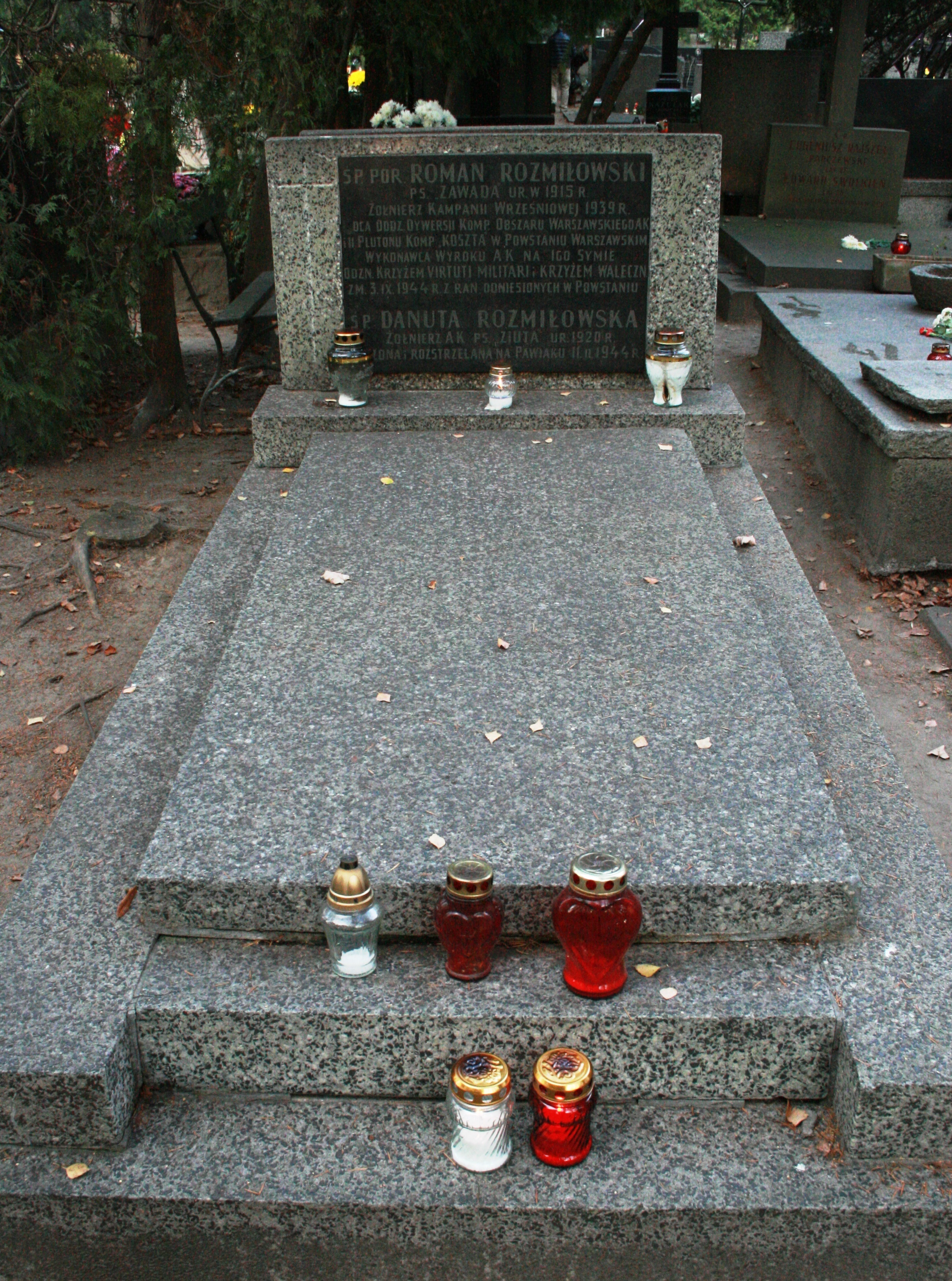 Grób Romana Rozmiłowskiego na Wojskowym Cmentarzu na Powązkach